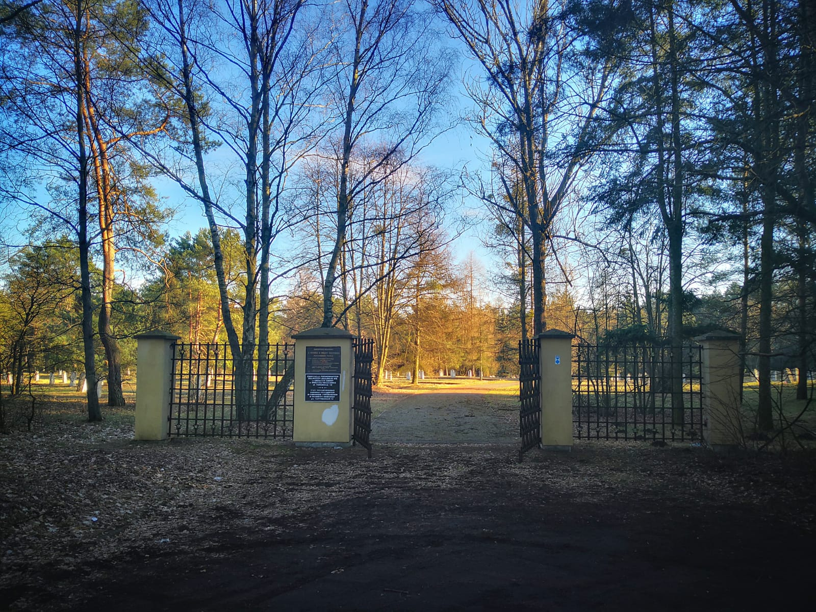 Cmentarz radziecki pod Toruniem1